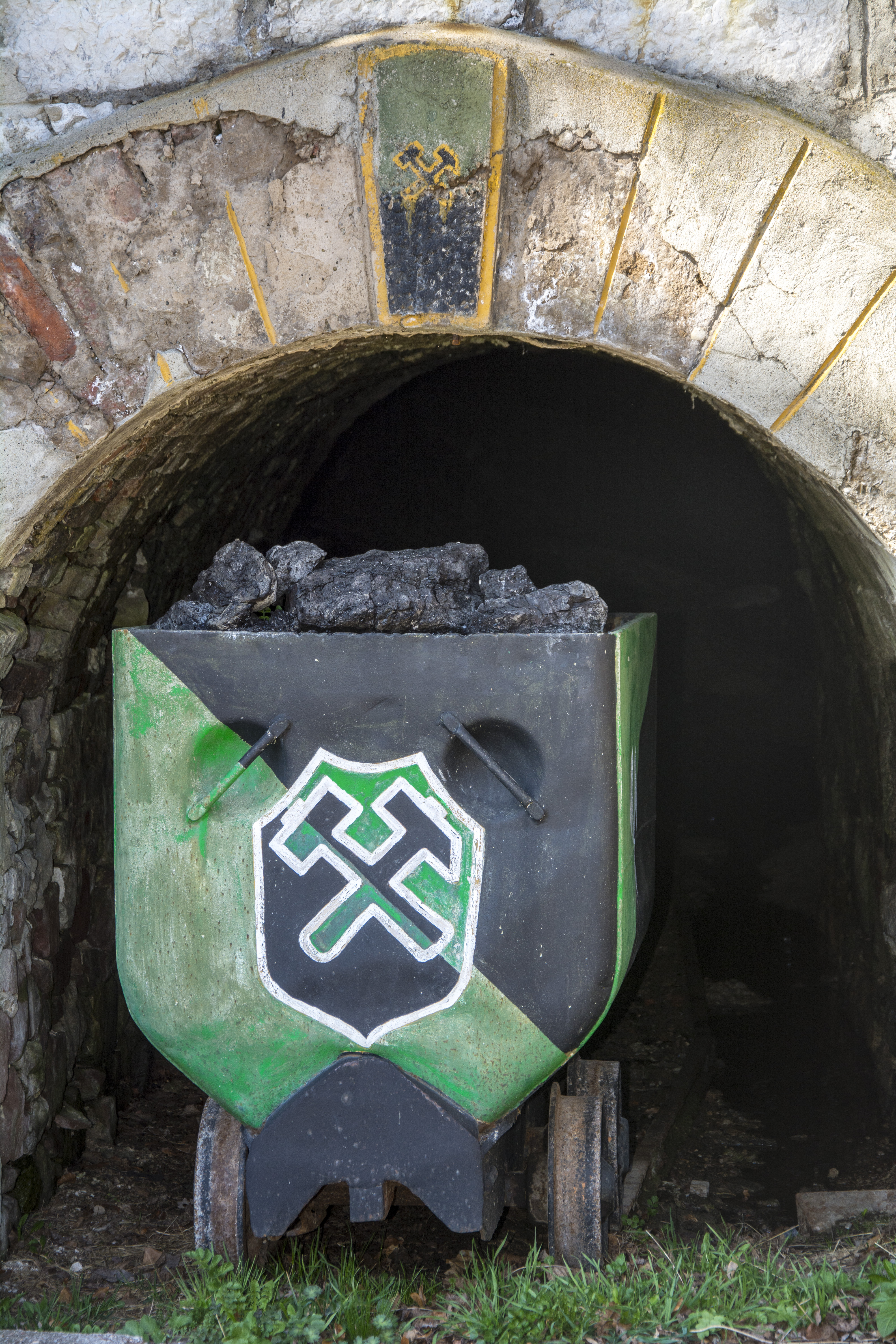 Detalj iz muzeja ugljarstva